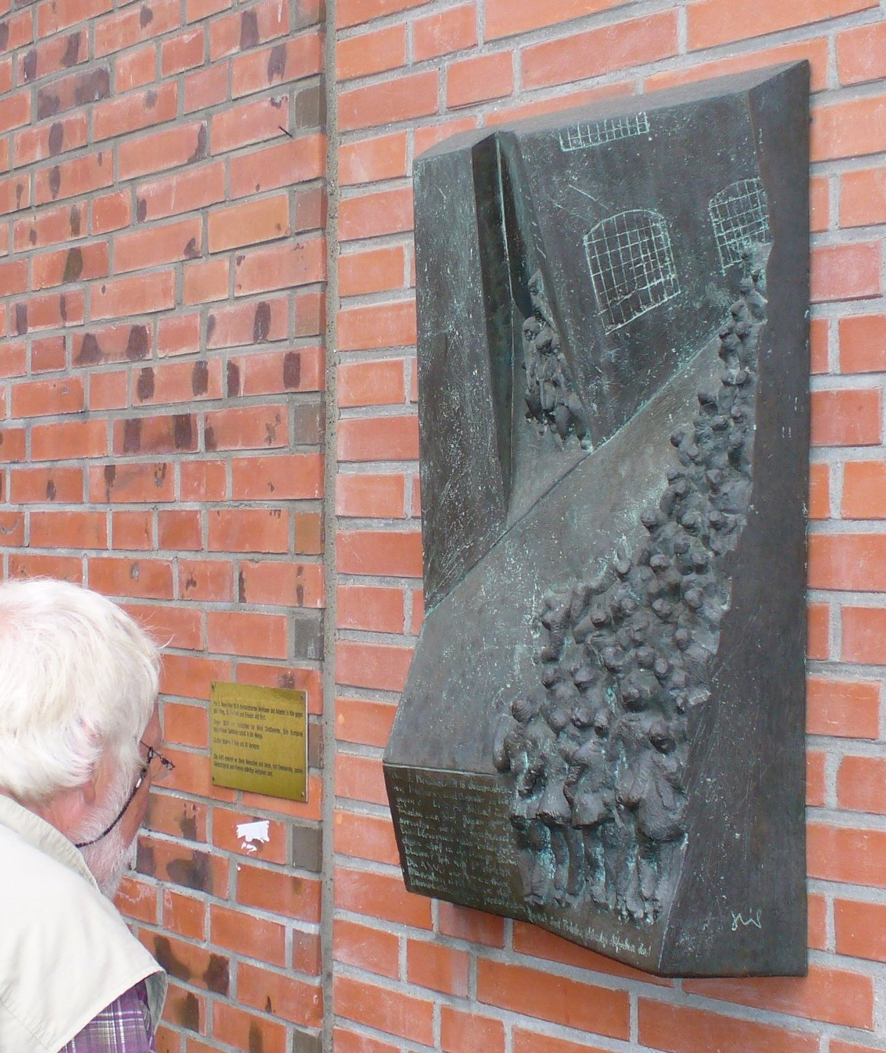 Eine Gedenktafel der Arbeiterwohlfahrt in Kiel an der Ecke Feldstraße Langer Segen erinnert an die Ereignisse am 3. November 1918 abends in Kiel. An dieser Stelle schoß eine MIlitärpatrouille auf Demonstranten, die die Entlassung von Befehlsverweigerern sowie Demokratie und Frieden forderten. Die Tafel wurde von dem Flensburger Bildhauer Hilger Schmitz im Jahr 1994 gestaltet. Inzwischen wurde das Gebäude der Arbeiterwohlfahrt abgerissen und die Gedenktafel befindet sich jetzt an dem dort neu errichteten Ärztehaus.